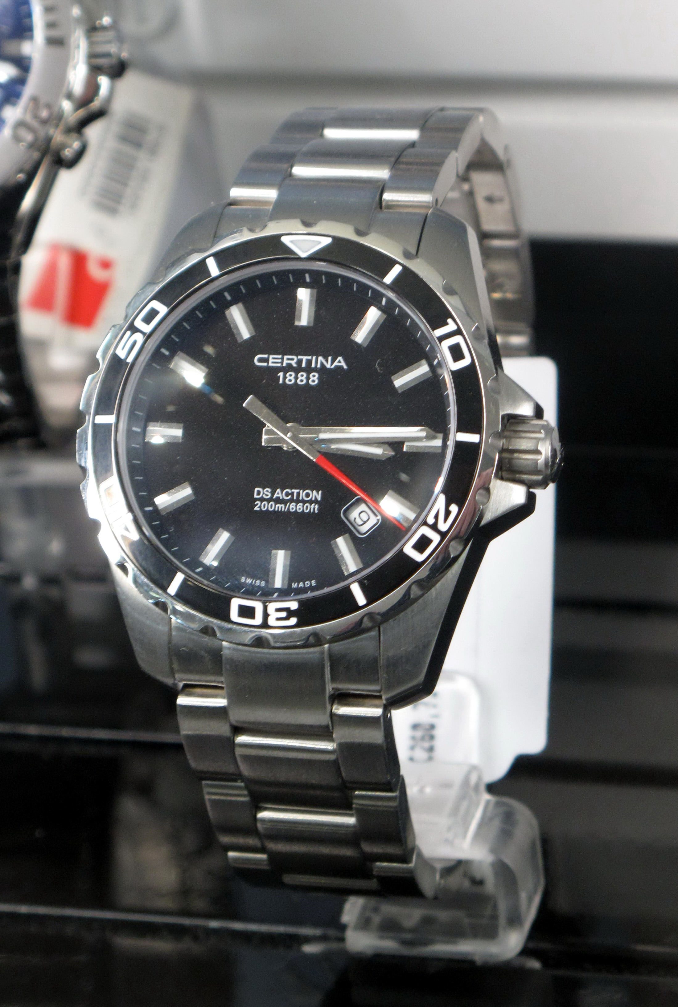 Hodinky Certina